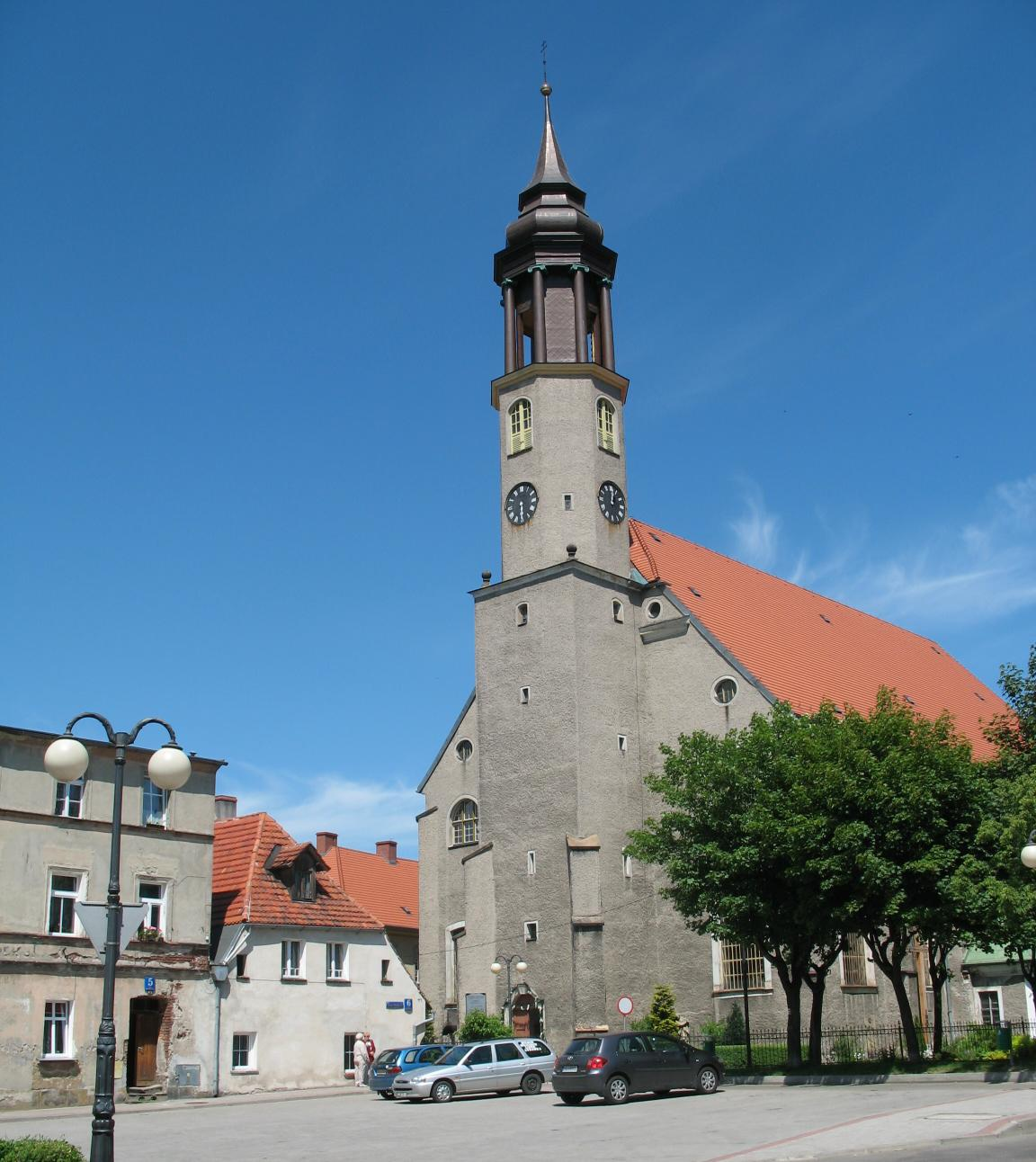 Lubawka (Liebau), Pfarrkirche